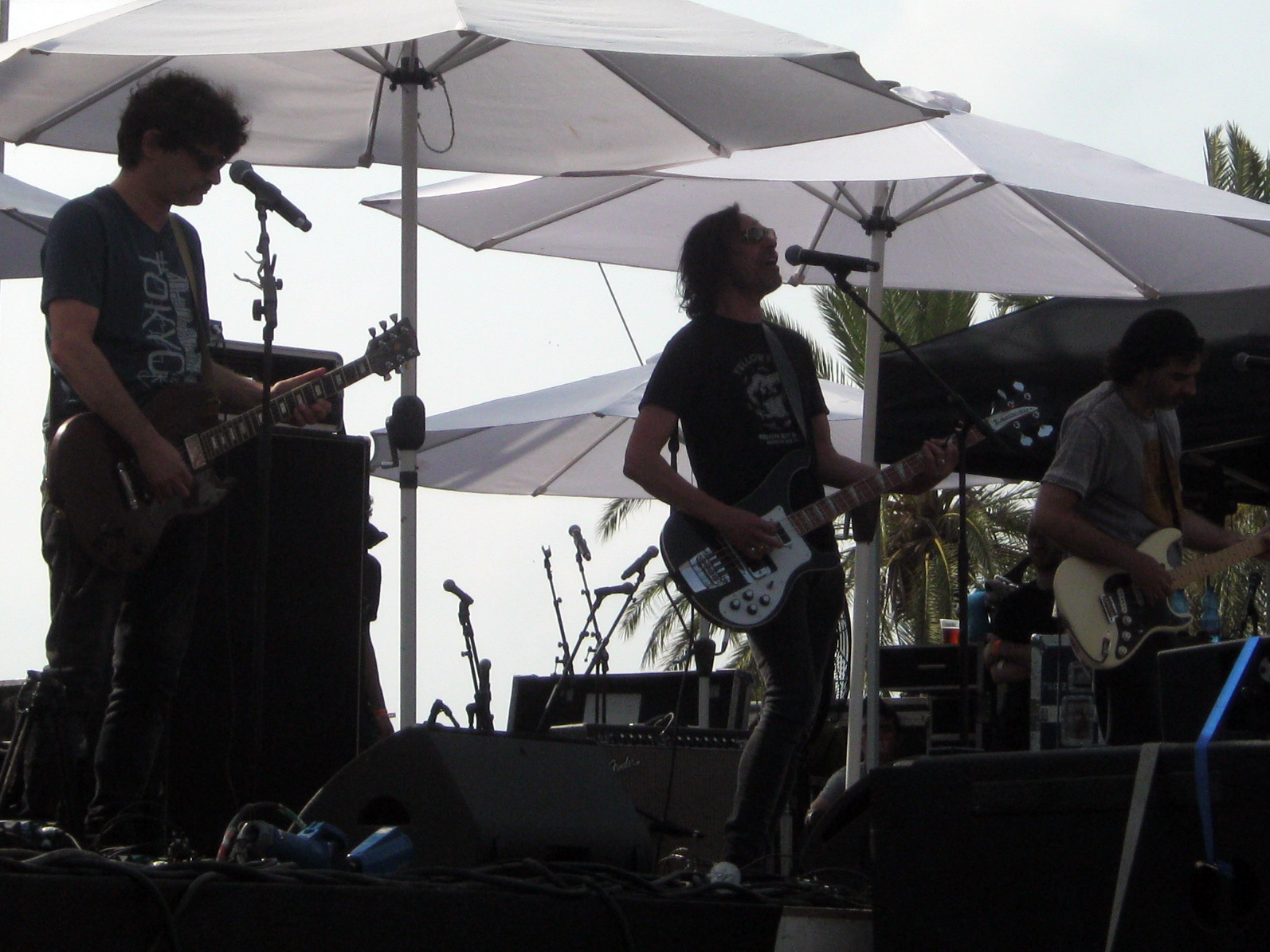 Israeli rock band, Eifo HaYeled? Stutent's festival. Tel Aviv University, 2016